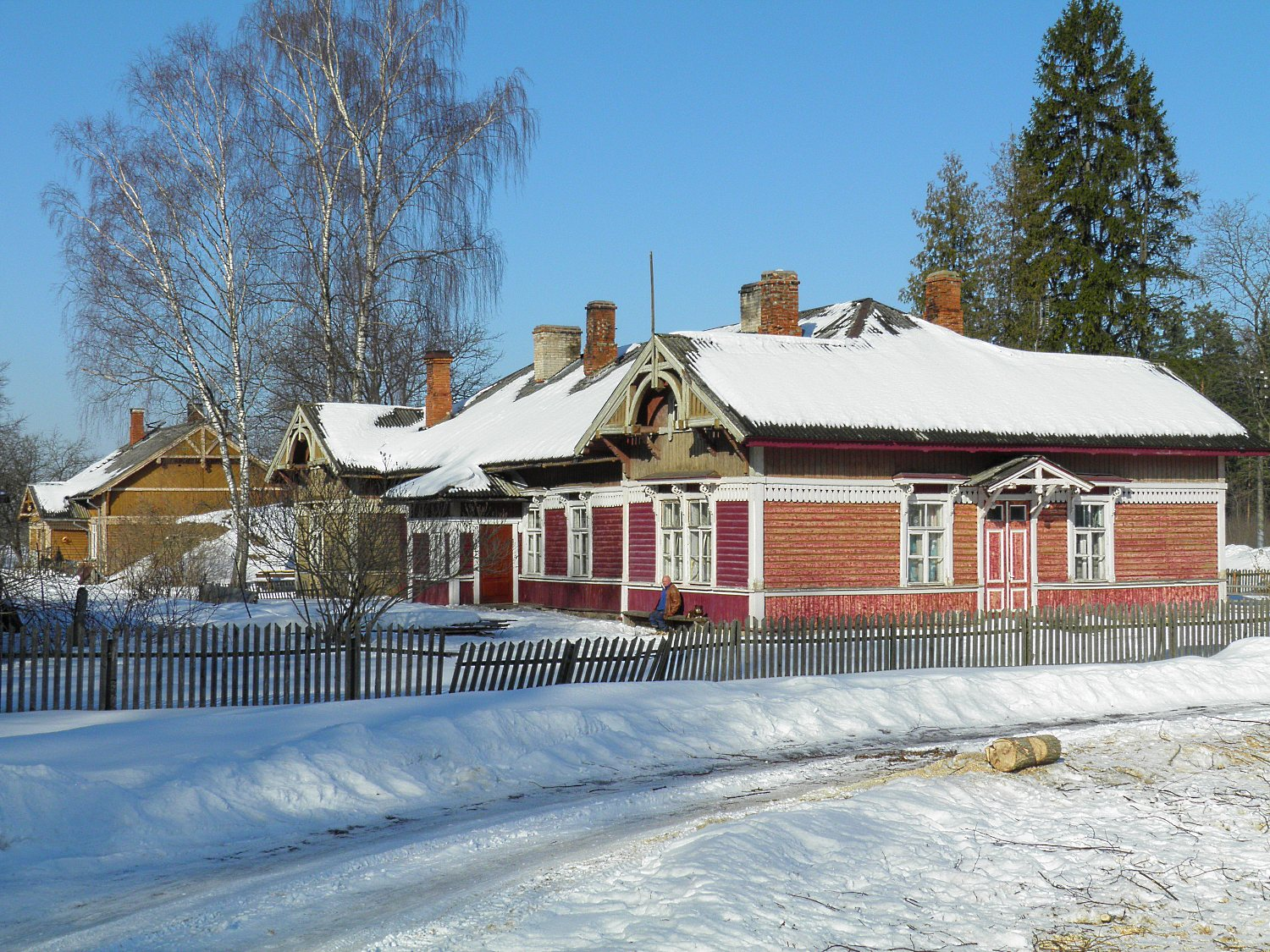 Хоз. постройка